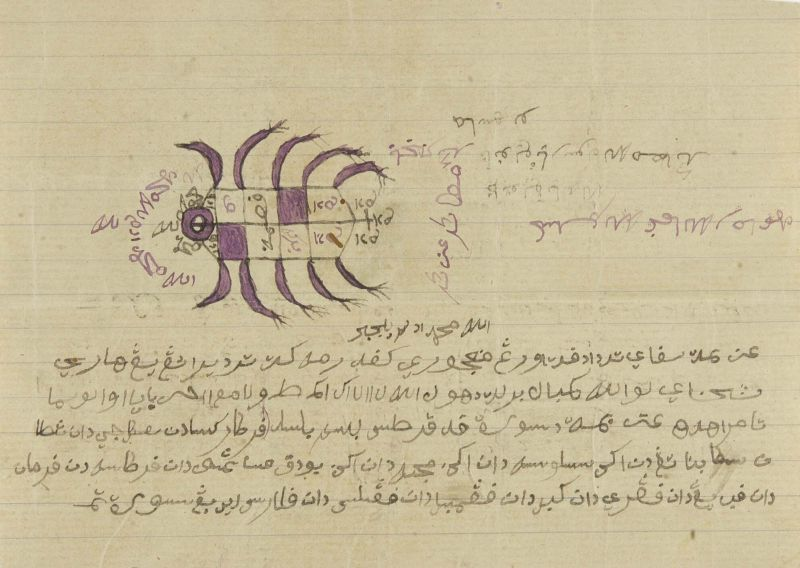 Amulet. Papieren amulet met Arabisch schrift Acèh: Ajeumat